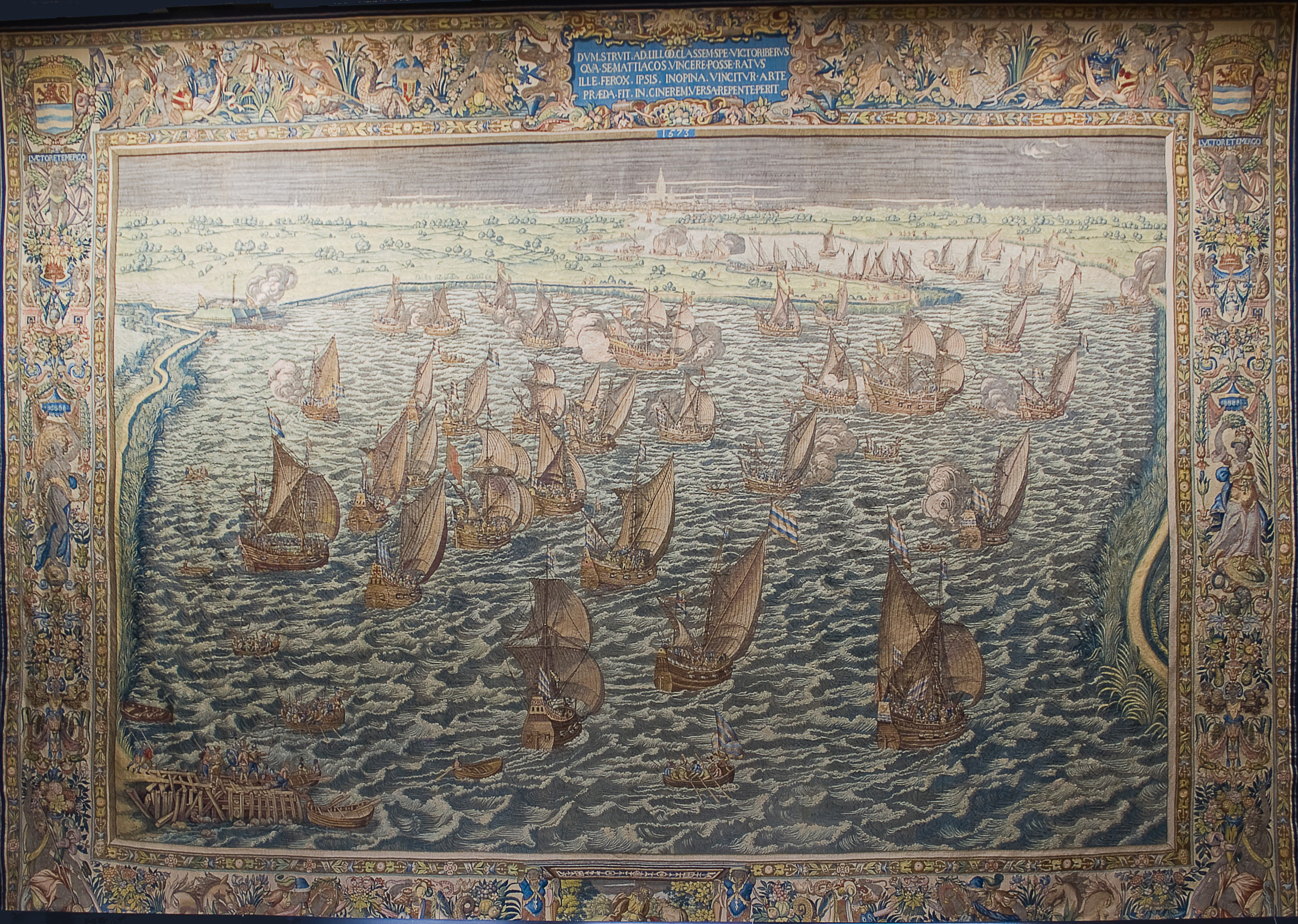 Wandtapijt De slag voor Lillo, Hendrick de Maecht, 30 mei 1574 Wandtapijt, De slag voor Lillo, Jan de Maecht, 30 mei 1574